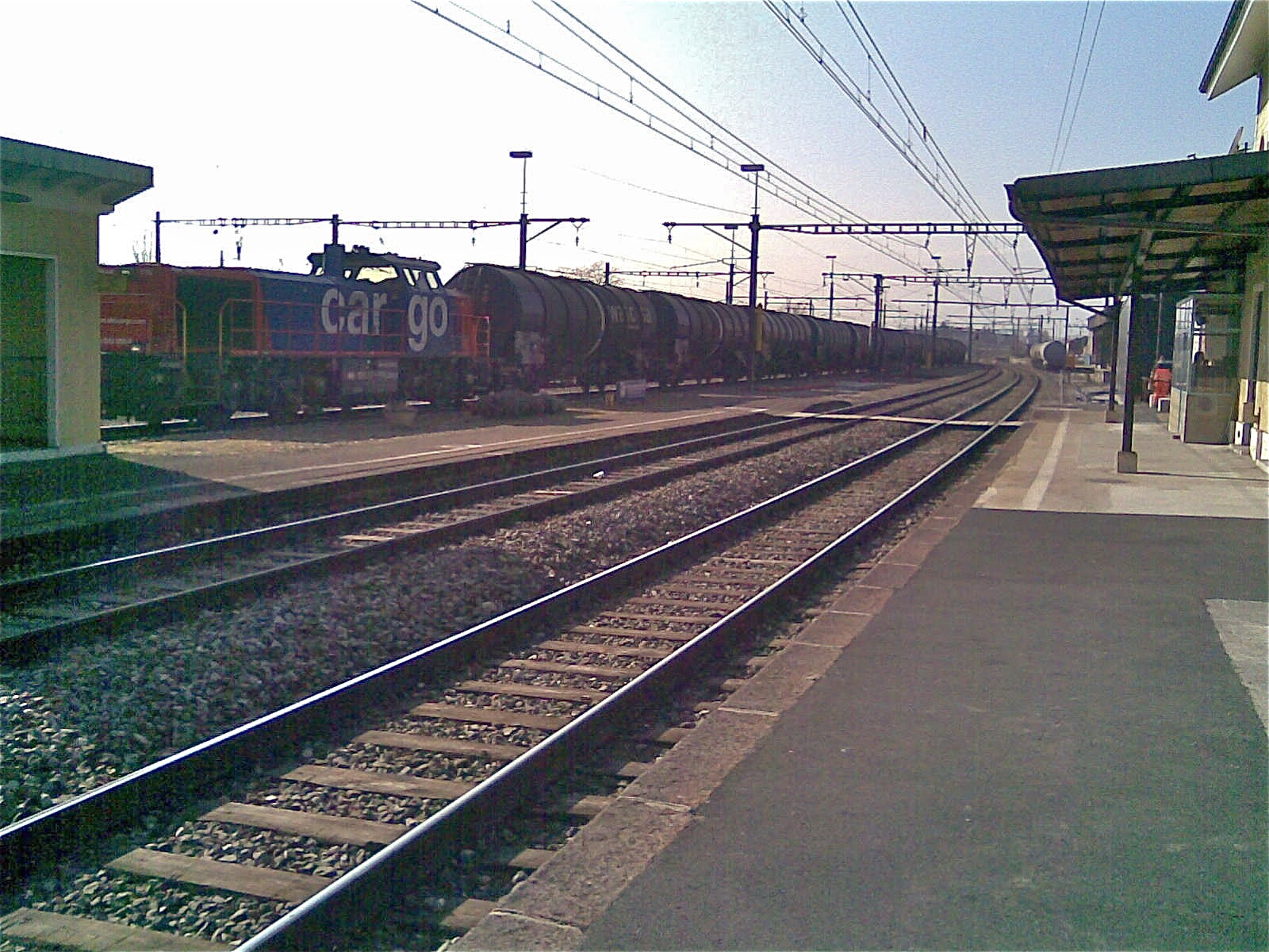 Gare CFF Vernier-Meyrin Cargo